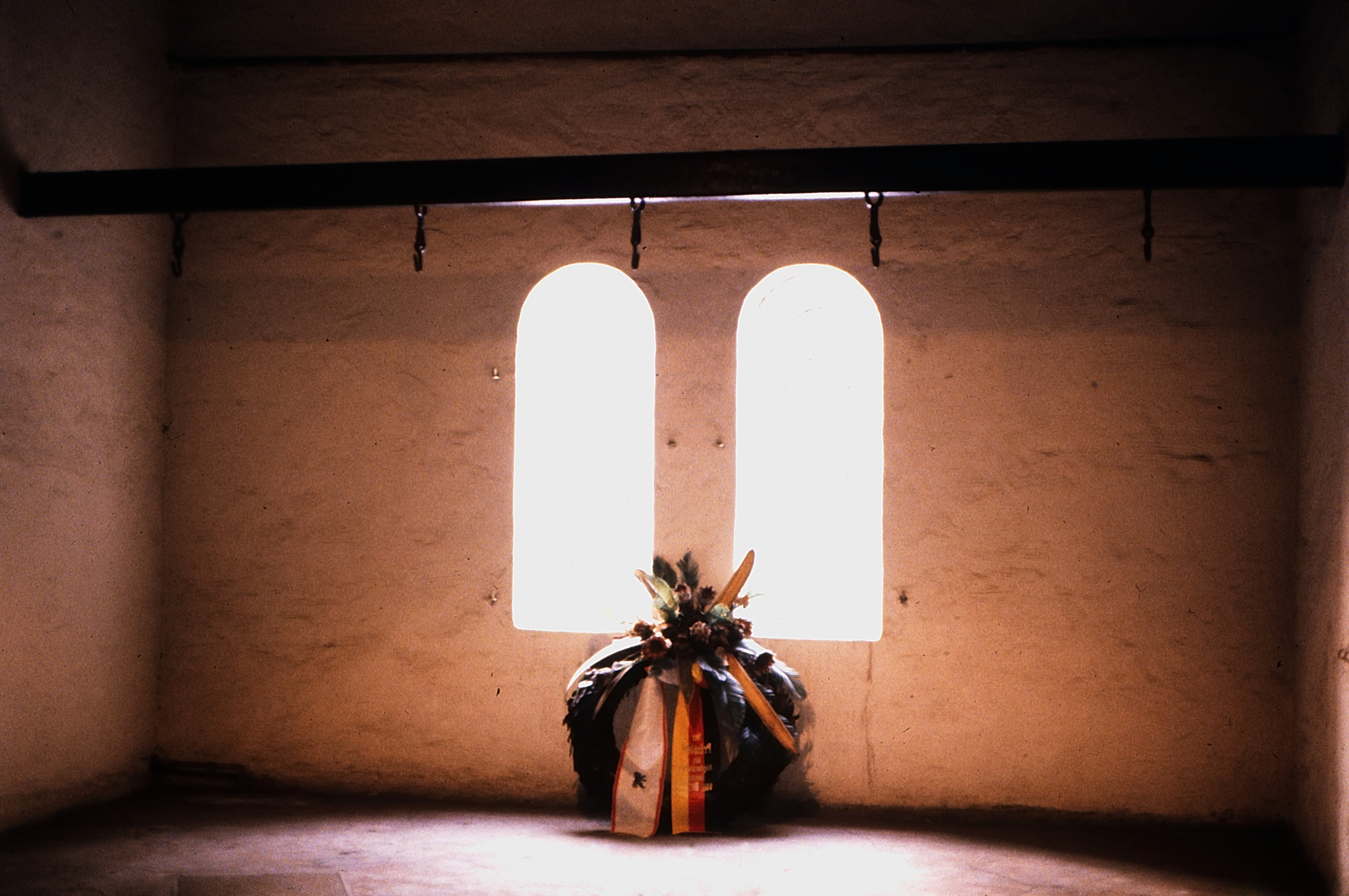 Gedenkstätte Plötzensee: Hinrichtungsstätte mit Gedenkkranz des Landes Berlin im Hinrichtungsschuppen